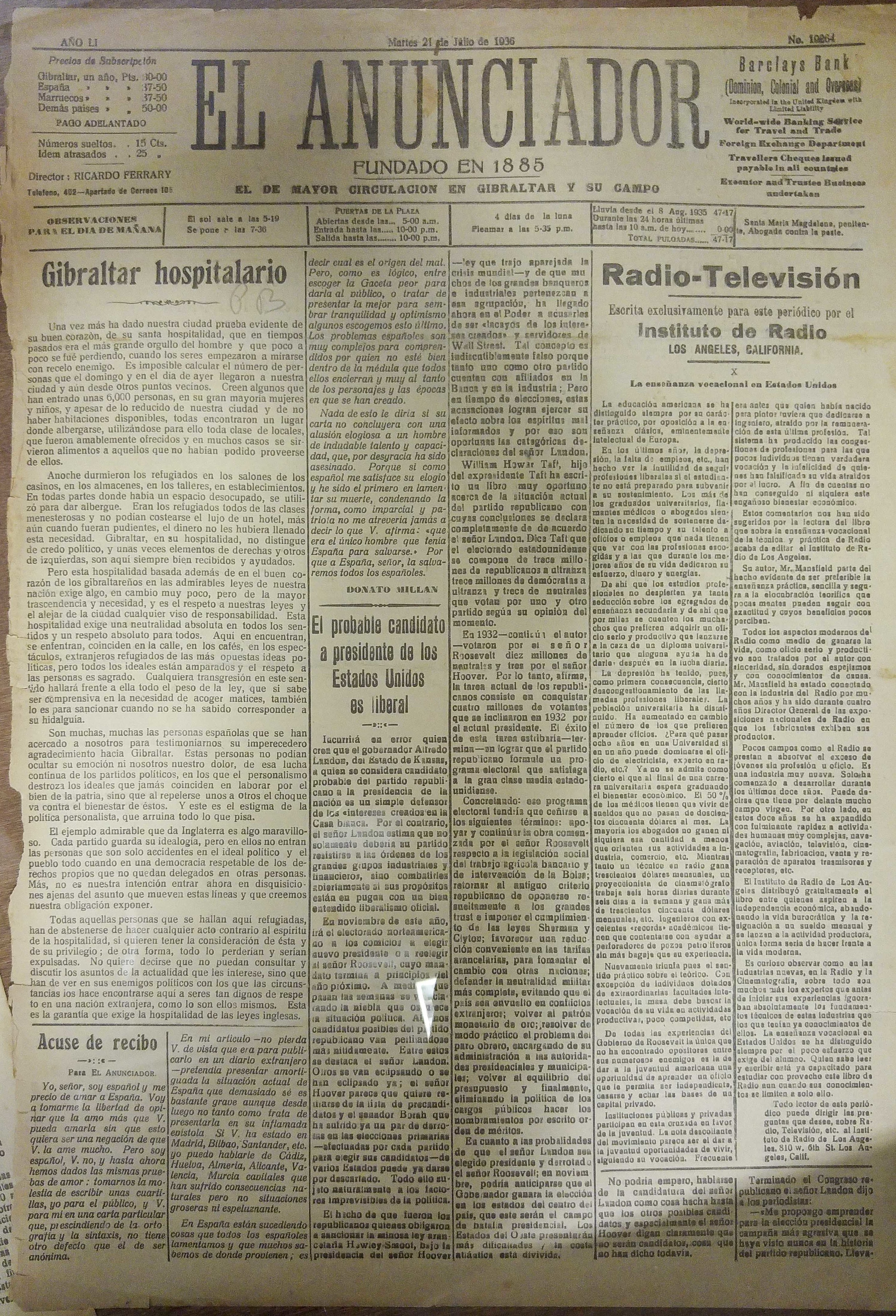 Exposición 'Gibraltar y la Guerra Civil Española'